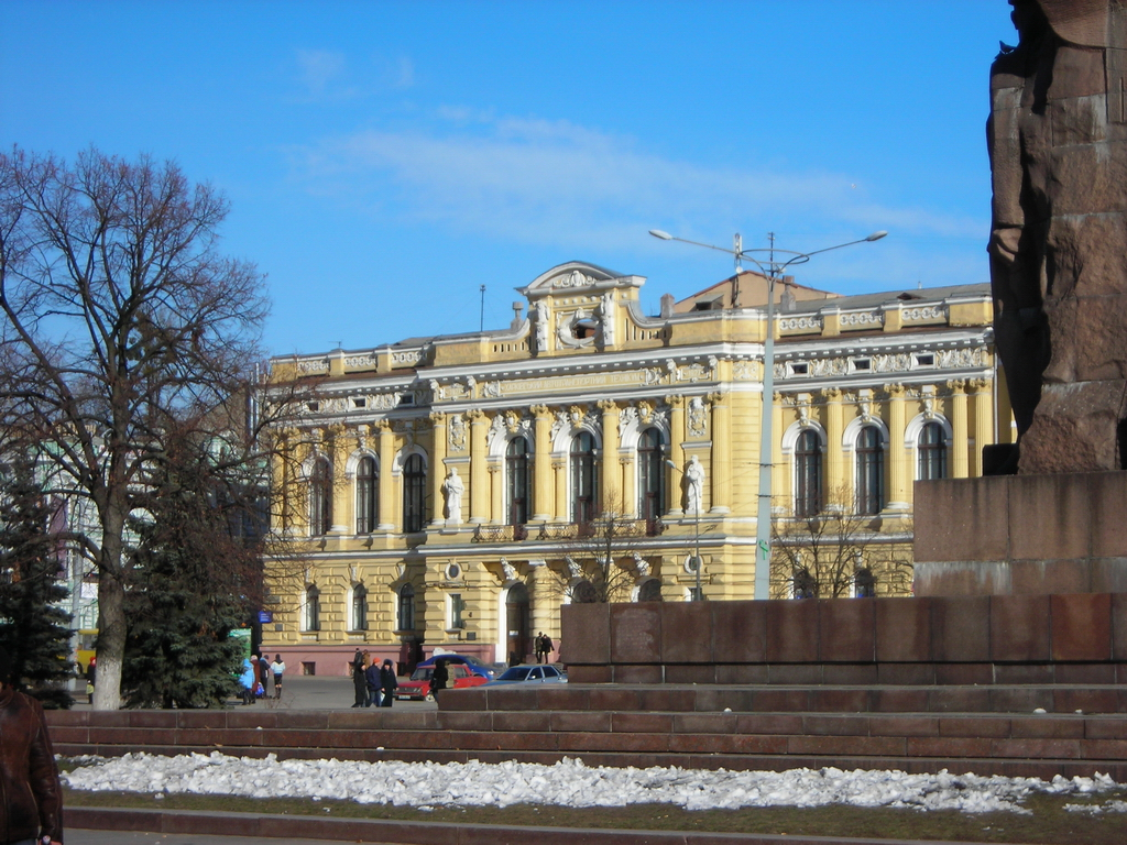 Площадь Конституции (Харьков), Автотранспортный техникум